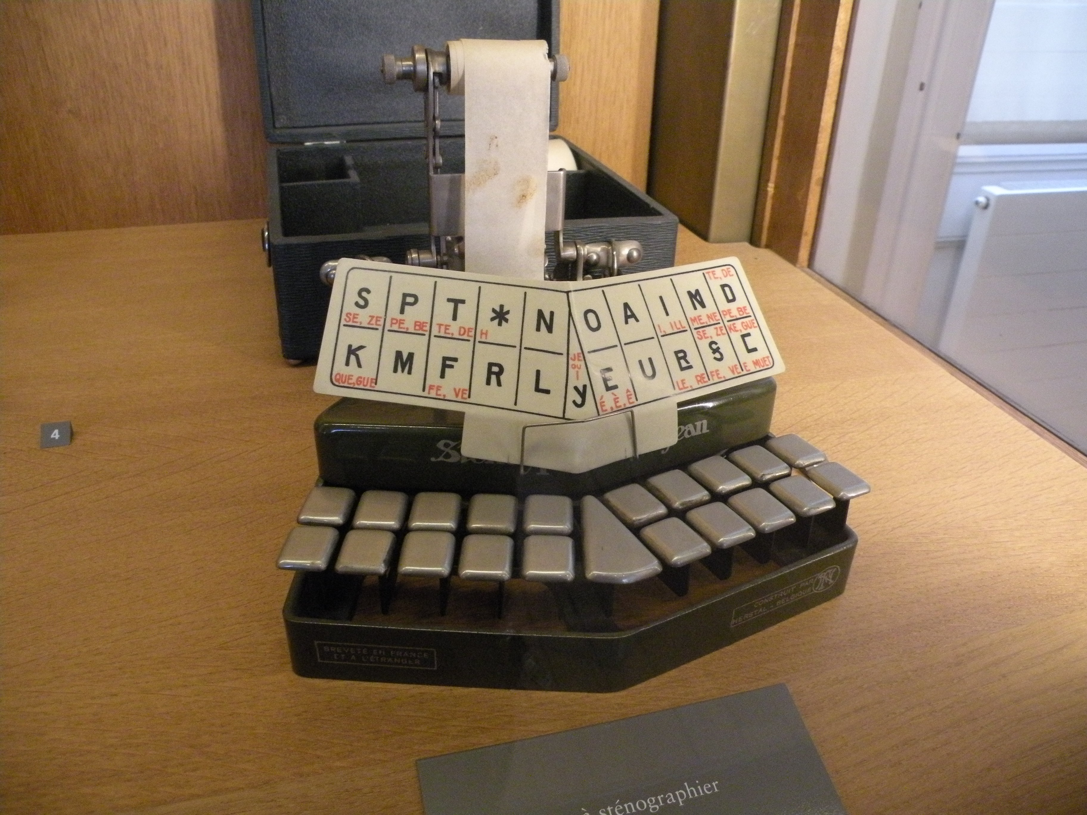 Communication dans Musée des Arts et Métiers